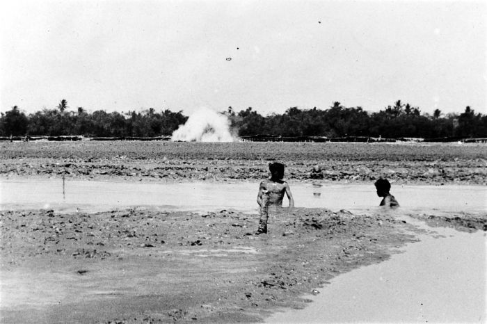 Repronegatif. Letupan lumpur di kawah "Mbah Ro Denok", kawah terbesar dari tujuh kawah lumpur (mud volcano) di Kuwu, Grobogan, Jawa Tengah. Di latar depan tampak tiga orang tengah mengumpulkan air hujan.